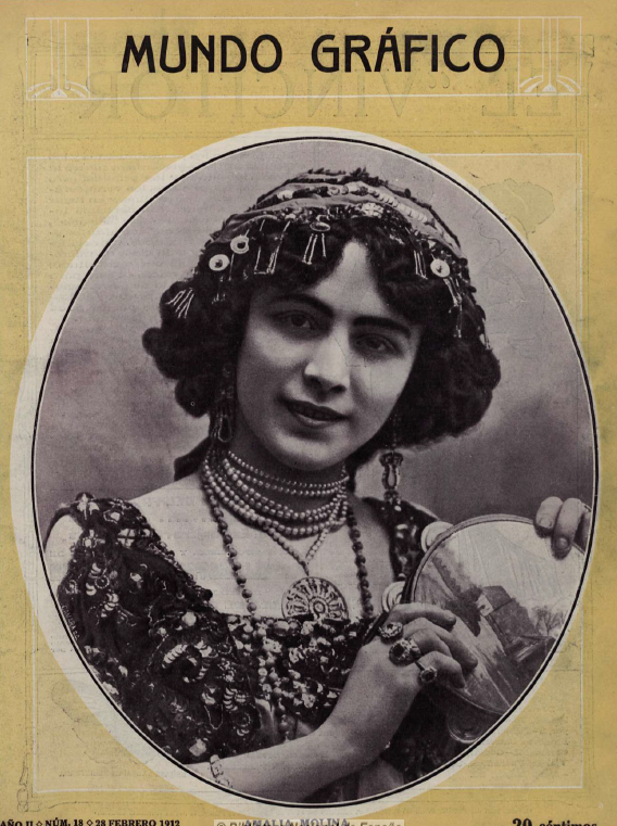 Fotografía de la cantante y bailaora española Amalia Molina publicada en la portada del semanario Mundo Gráfico en 1912